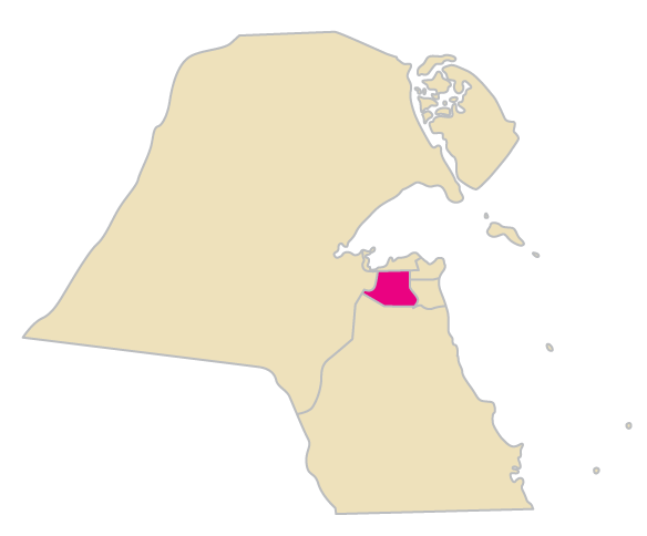 Al Farwaniyah